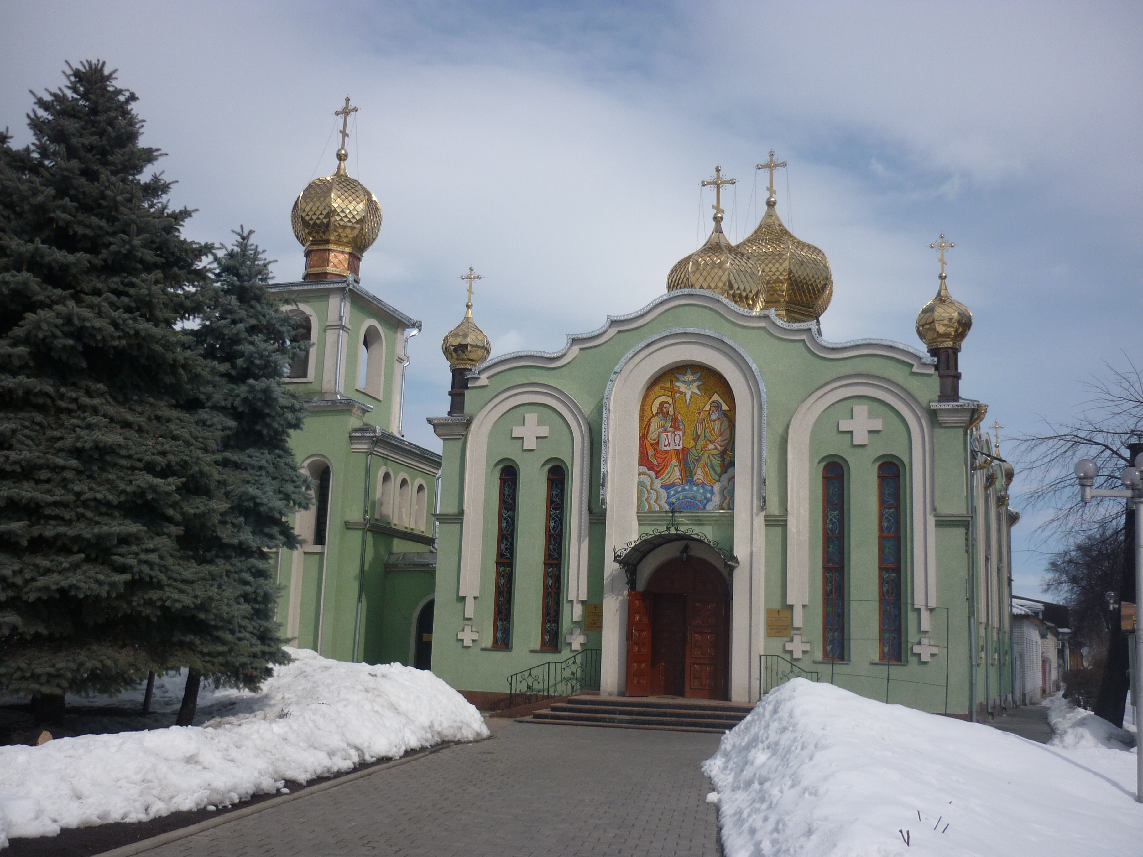 Свято-Троїцький_собор (Черкаси): Свято-Троїцький_собор (Черкаси)